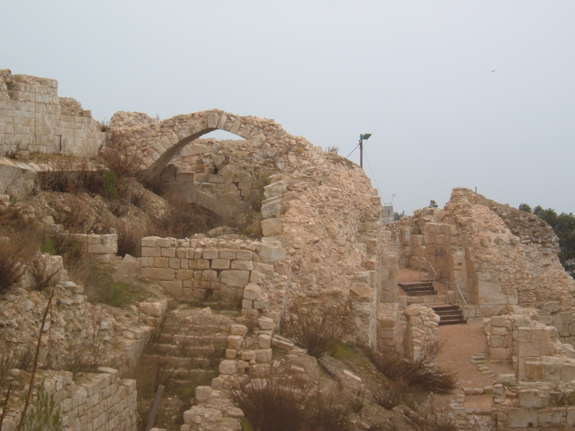 Safed Citadel מצודת צפת